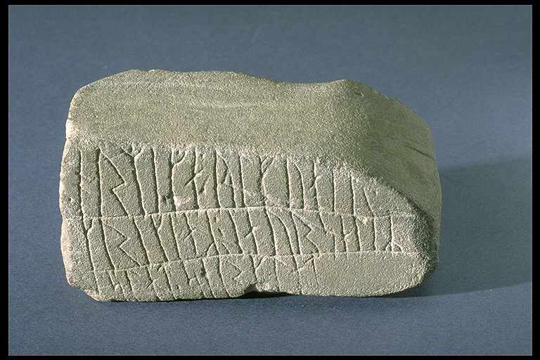 Inskriften lyder: Ormika Ulvair Grekland, Jerusalem, Island, Särkland. Motiv: G216 Timansbrynet Nyckelord: Runor Kategori: Runristning/runsten Inskriften lyder: Ormika Ulvair Grekland, Jerusalem, Island, Särkland.